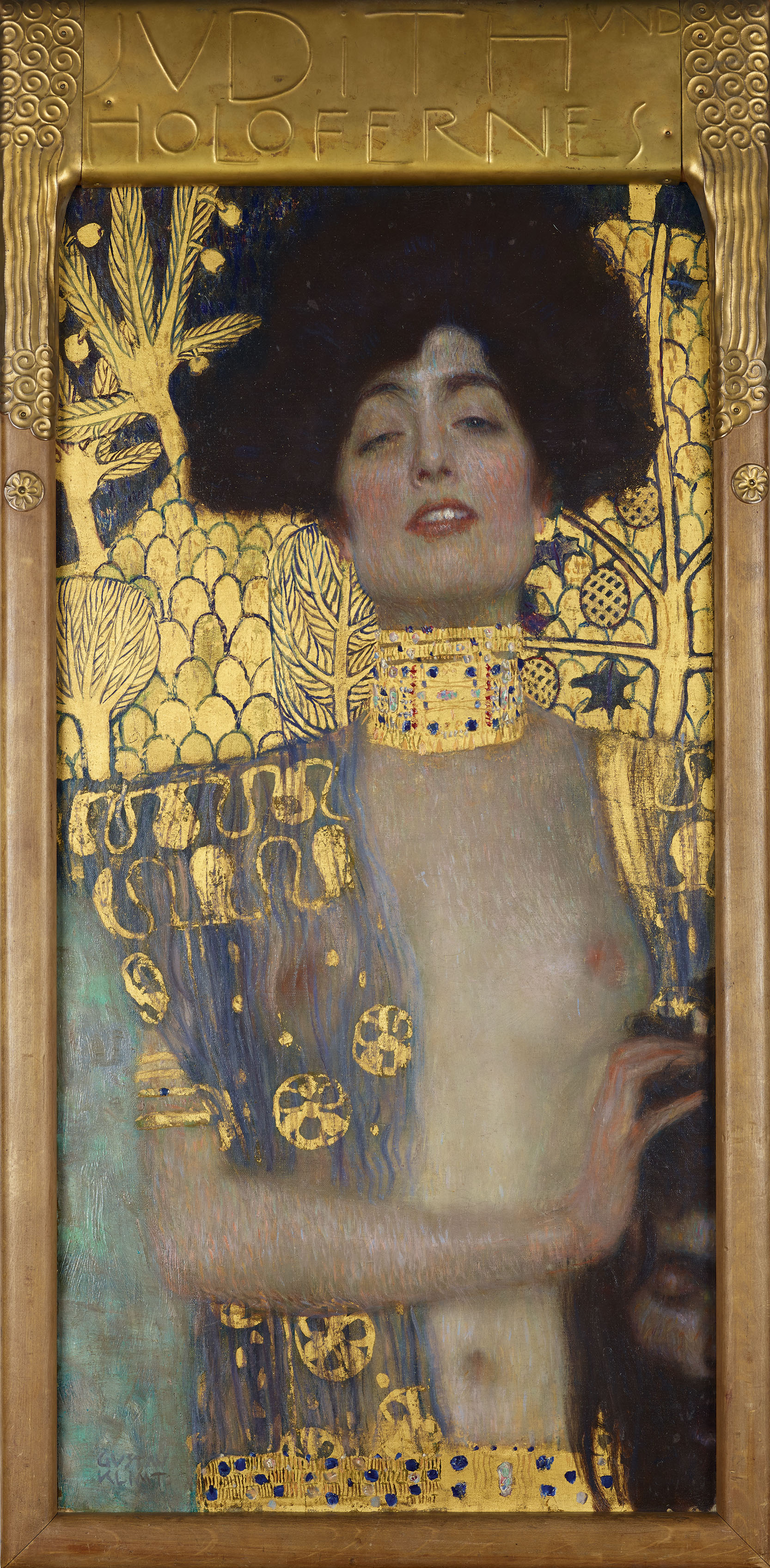 Judith 1